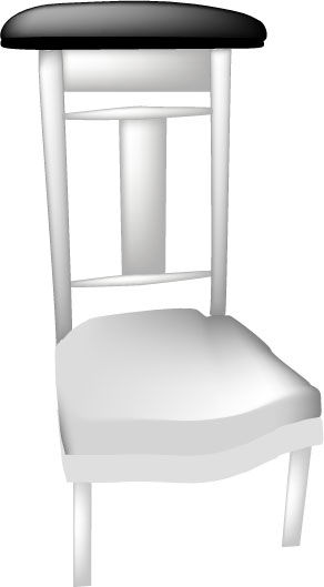 fr : Description : accoudoir (Partie horizontale sur le haut du dossier d'un siège dit ponteuse ou voyeuse) Réalisé par ZA Illustration pour le Wiktionnaire (accoudoir )